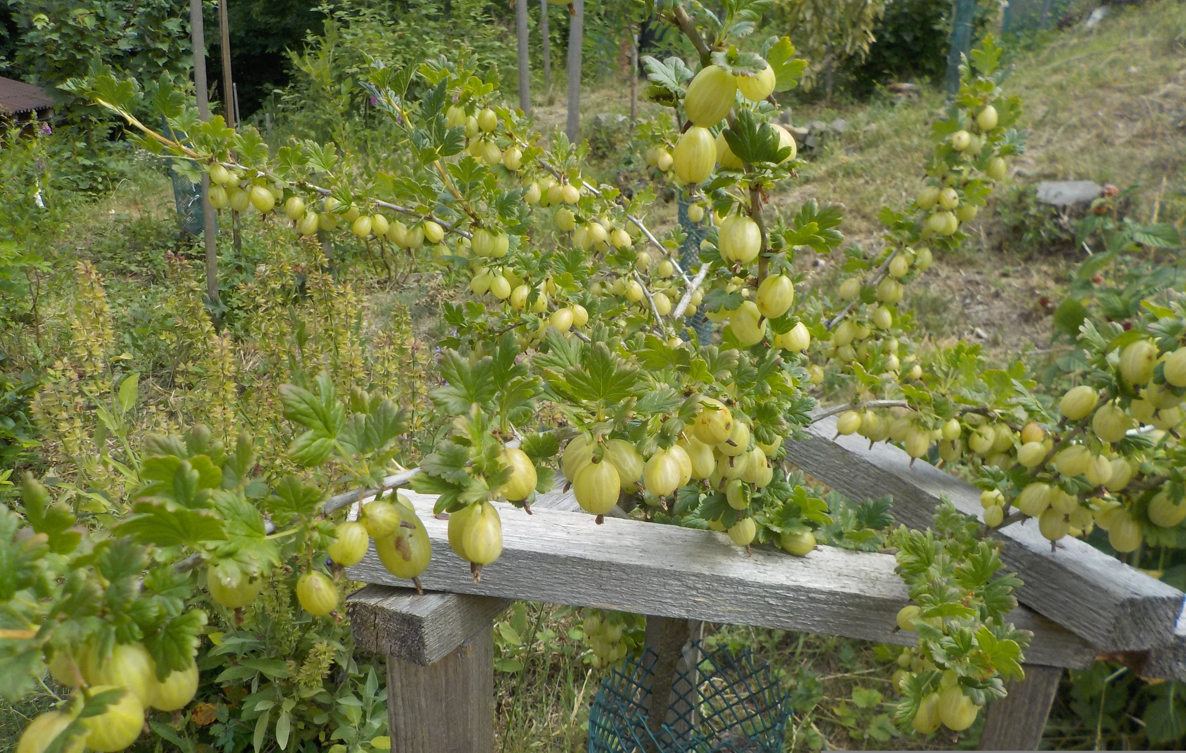 Angrešt rostoucí ve dřevěné konstrukci, která tam je proti zajícům